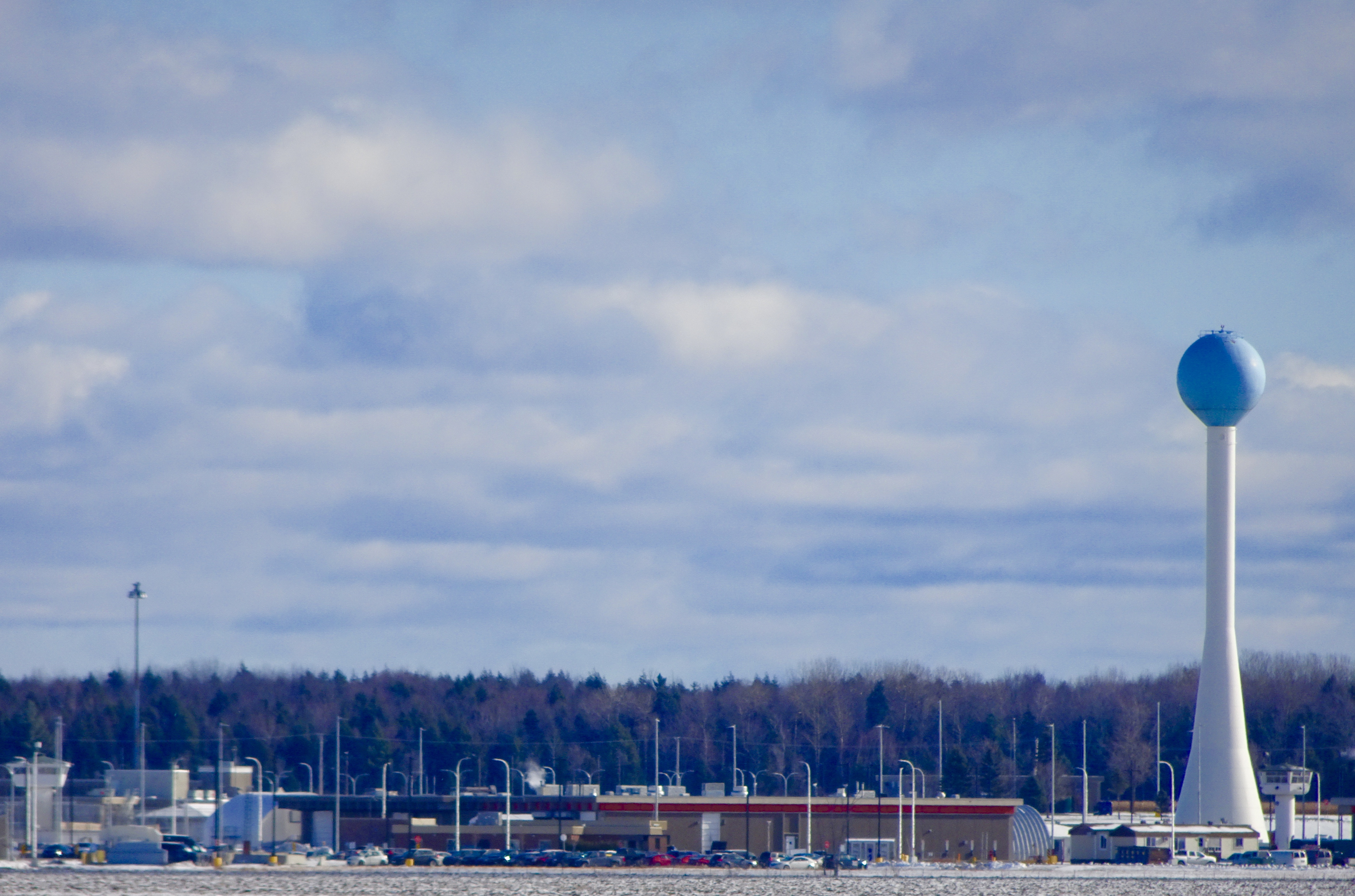 Pénitencier de Ste-Anne-des-Plaines